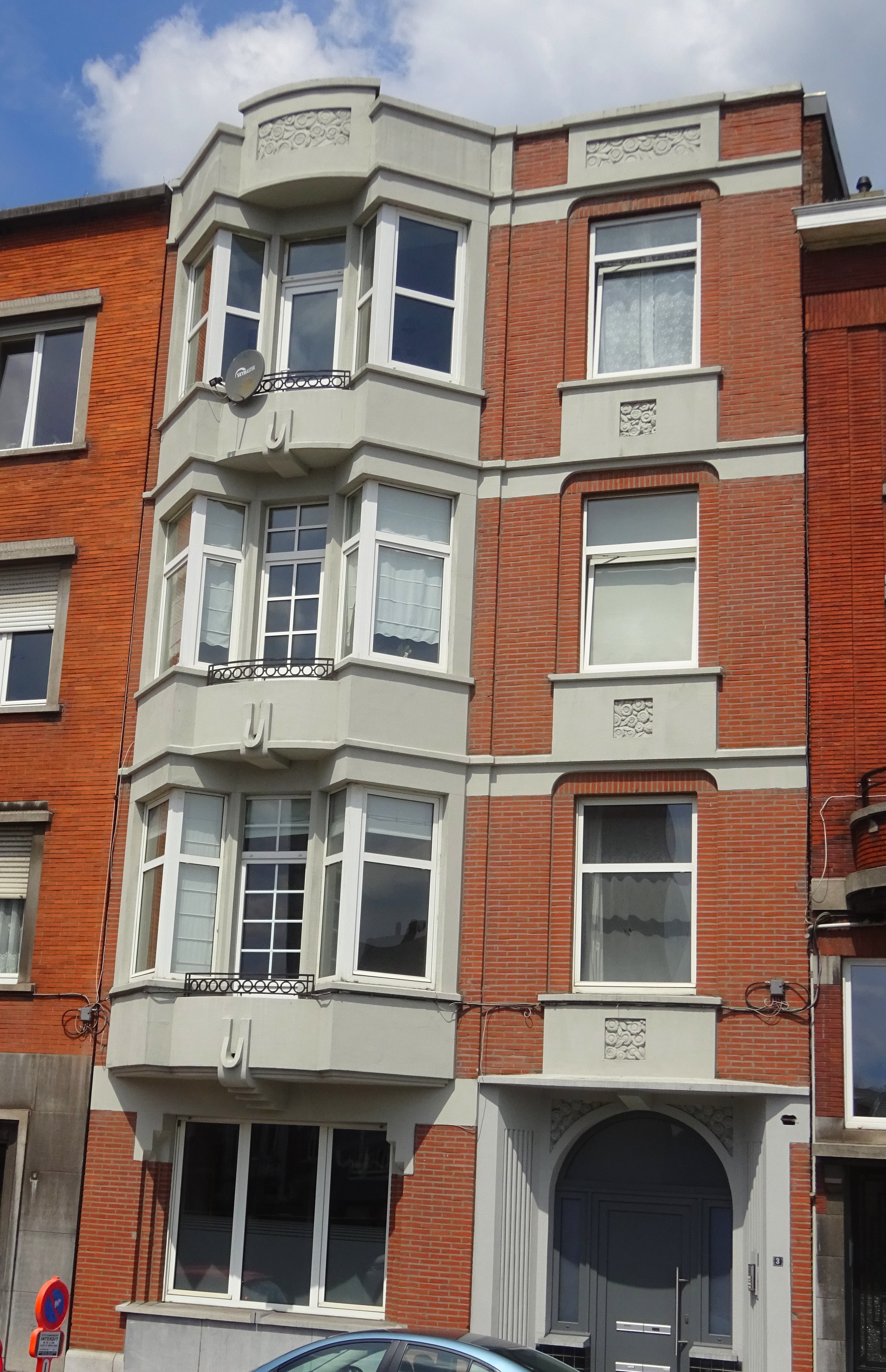 Quai de l'Ourthe, 3, Outremeuse, Liège : immeuble Art déco